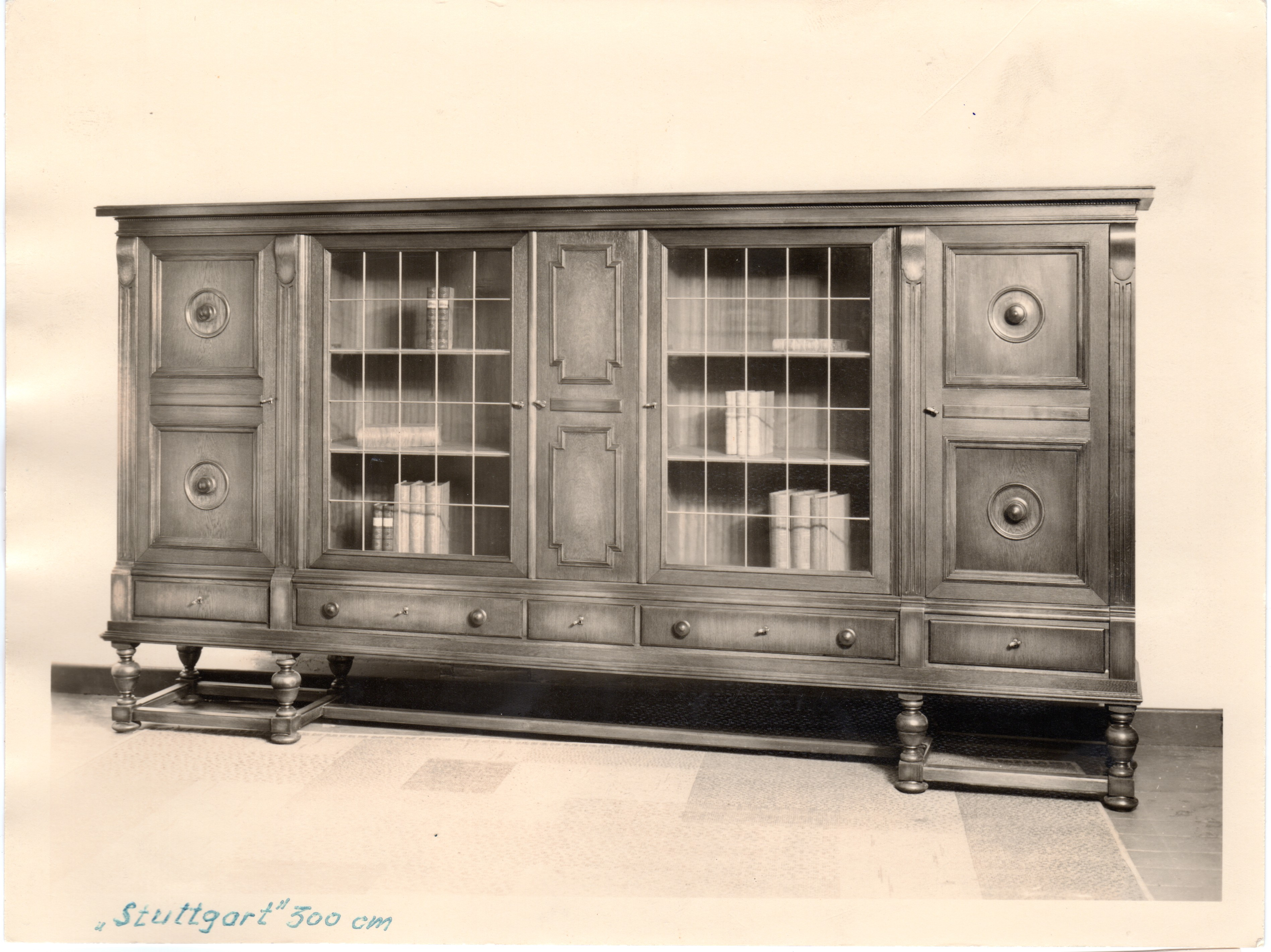 Schrank „Stuttgart“, Eiche antik, 300 cm, 1960er Jahre, Heinrich Hausmann Möbelfabrik, Steinheim/Westfalen